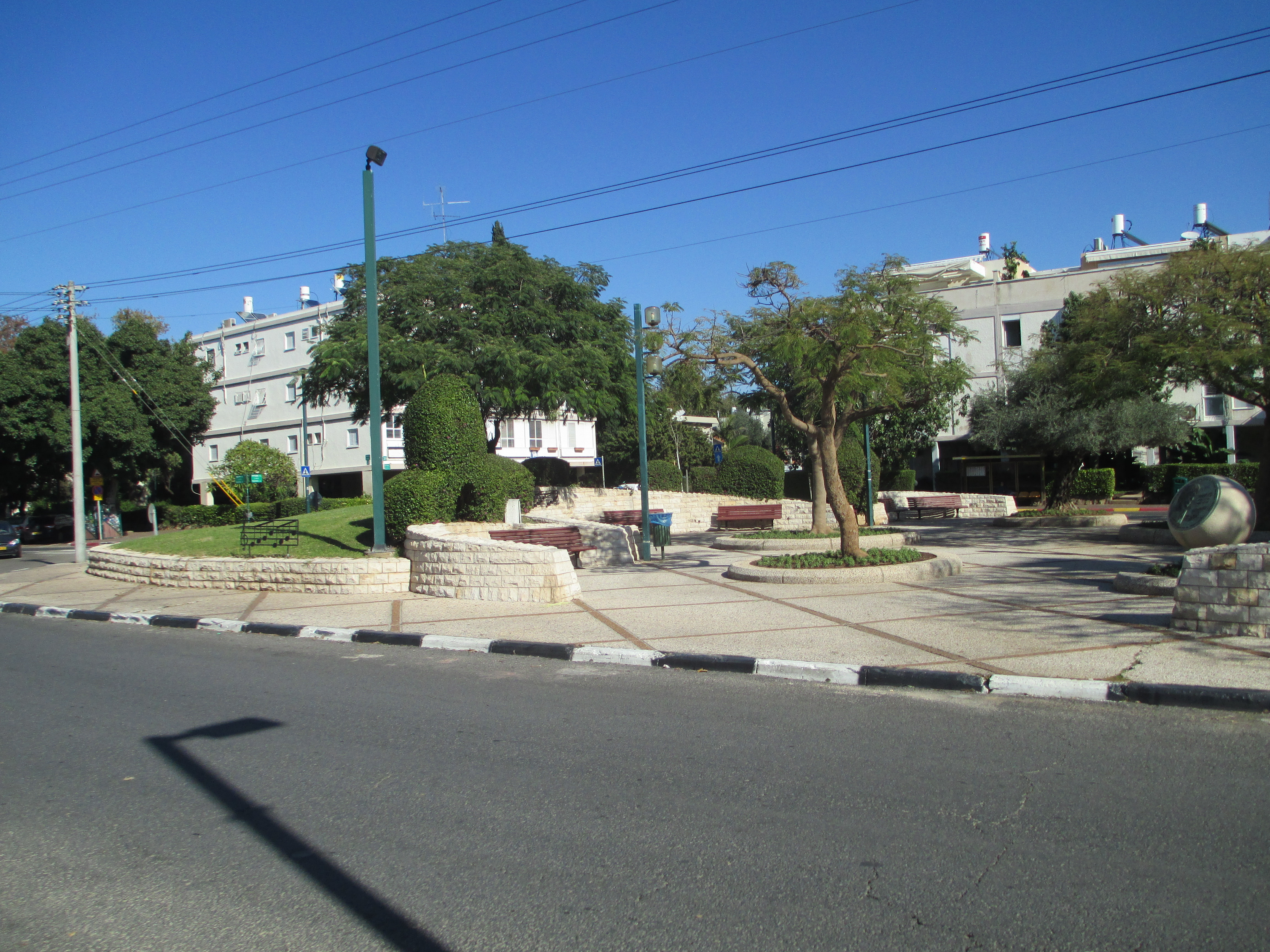 כיכר עוזי חיטמן ברמת חן